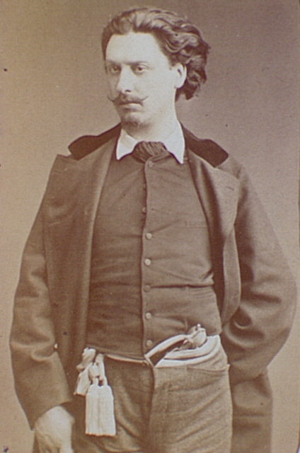 Pilotell, pseudonimo di Georges Labadie (1845-1918)